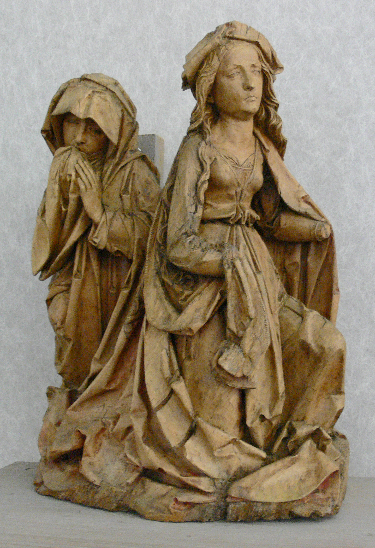 Trauernde Frauen, aus einer Beweinungsgruppe, vielleicht von der Predella des Detwanger Altars, (ursprünglich gefasst)